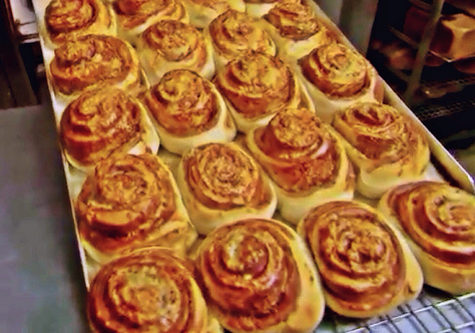 Cheesymite